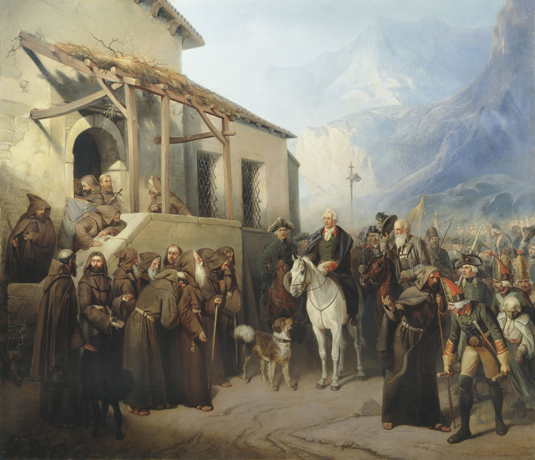 . Холст, масло. Государственный дворцово-парковый музей-заповедник «Гатчина». см. атрибуцию